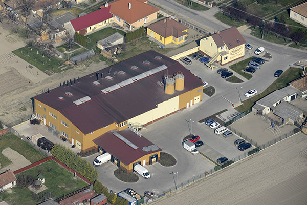 Lipóti kenyérgyár légi felvételen